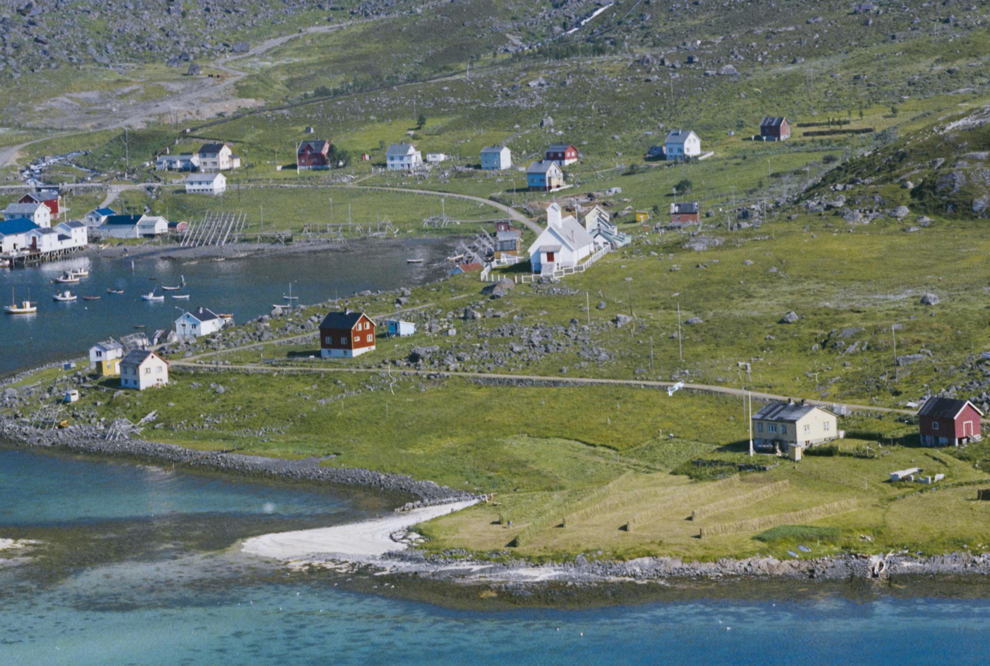 Bergsfjord kirke. Foto: Widerøes Flyveselskap, fra Nasjonalbibliotekets samling.